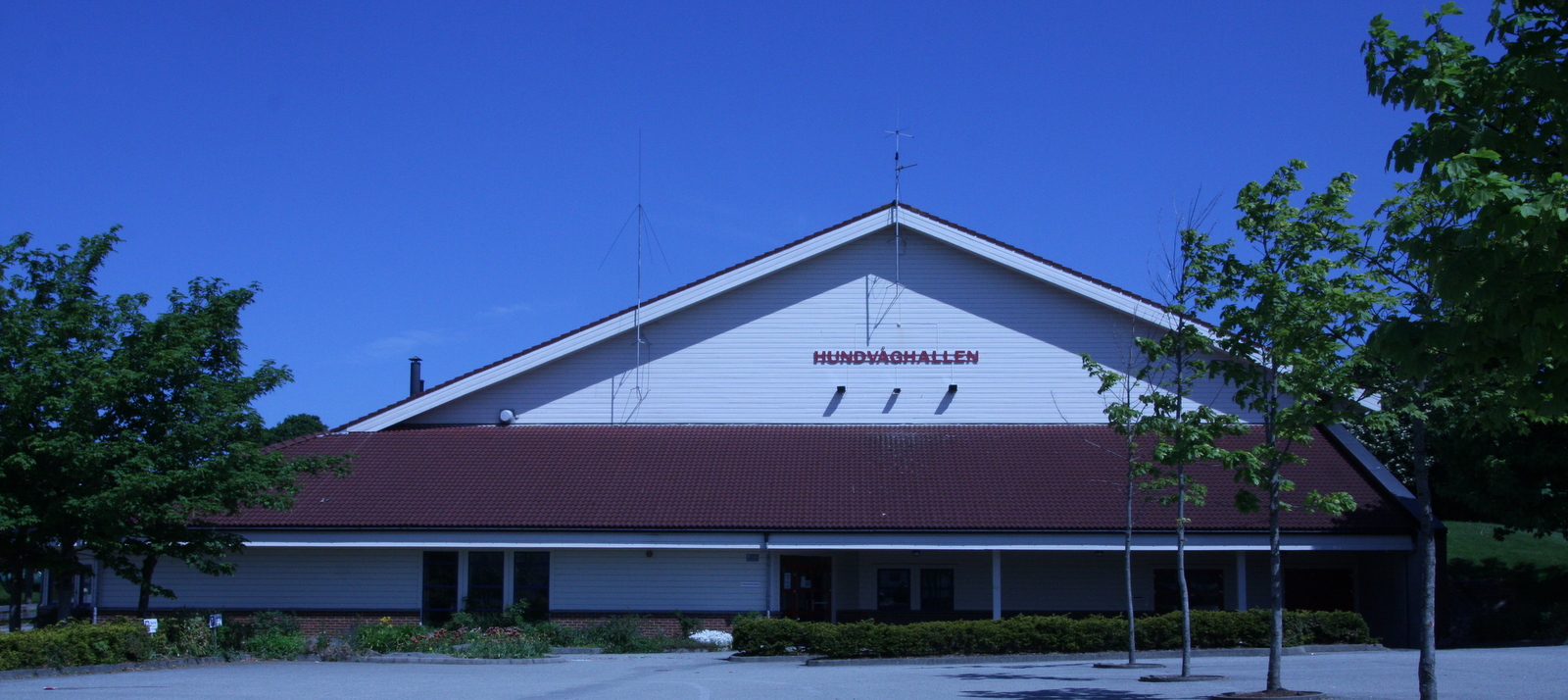 Hundvåghallen